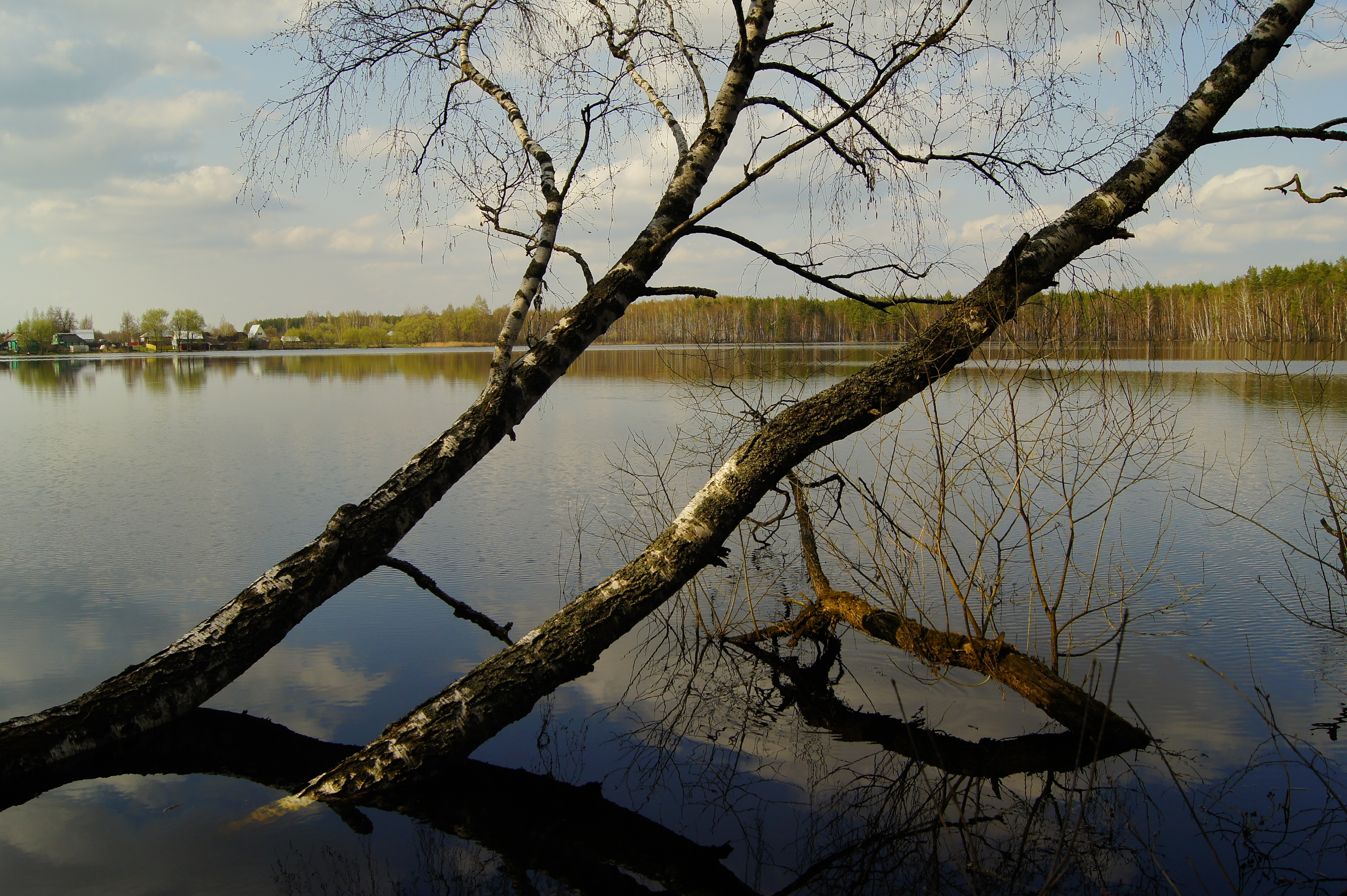 Лебединое (Селезнёвское) озеро, Клепиковский район This image is related to the protected area of Russia number 6210061